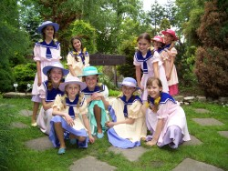 Zespół Wokalno-Taneczny "Ychtis" - Wigilia w Krakowskim Teatrze Scena STU w dniu 20.12.2008 r.